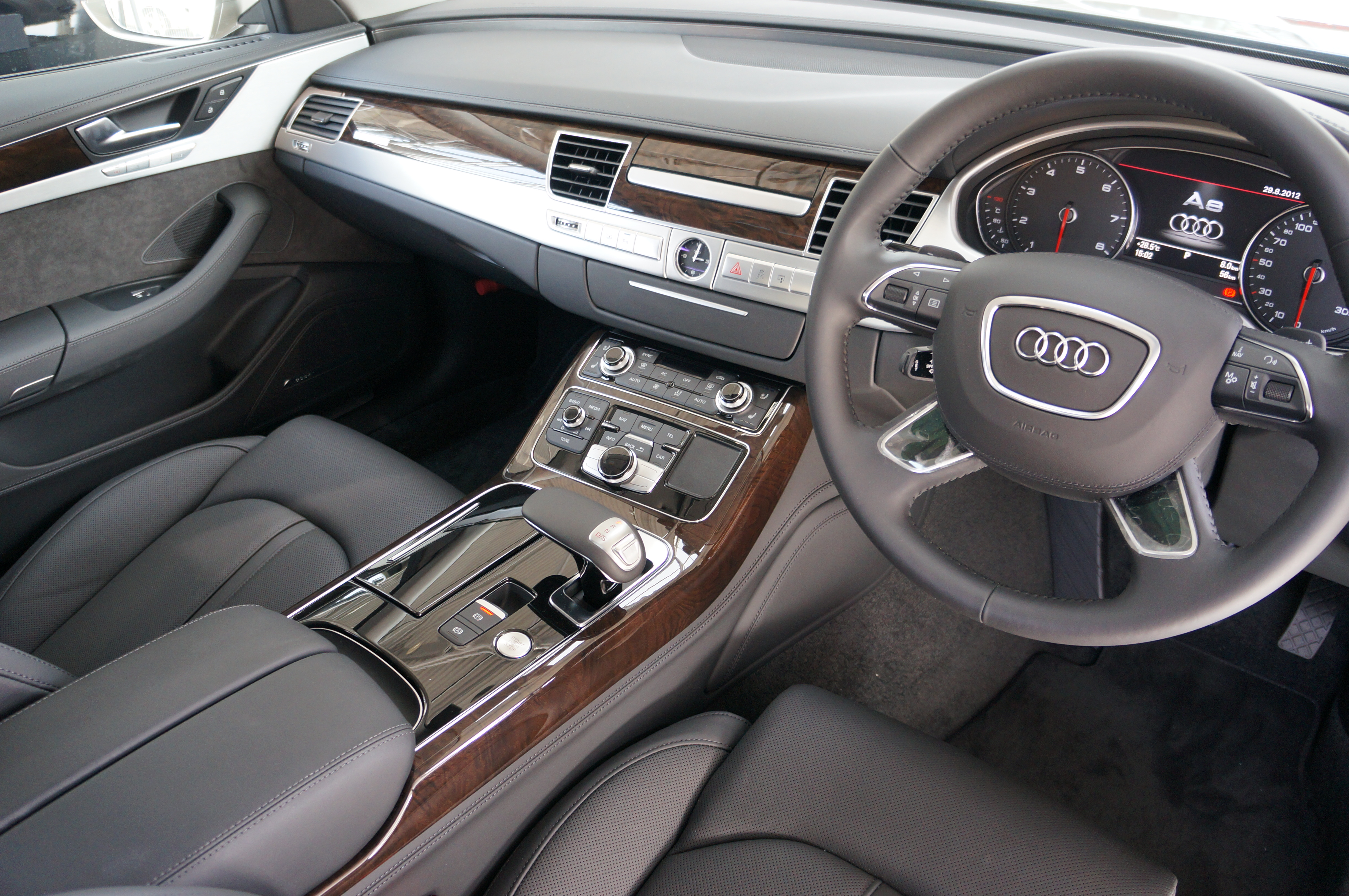 Audi A8 日本仕様車 内装